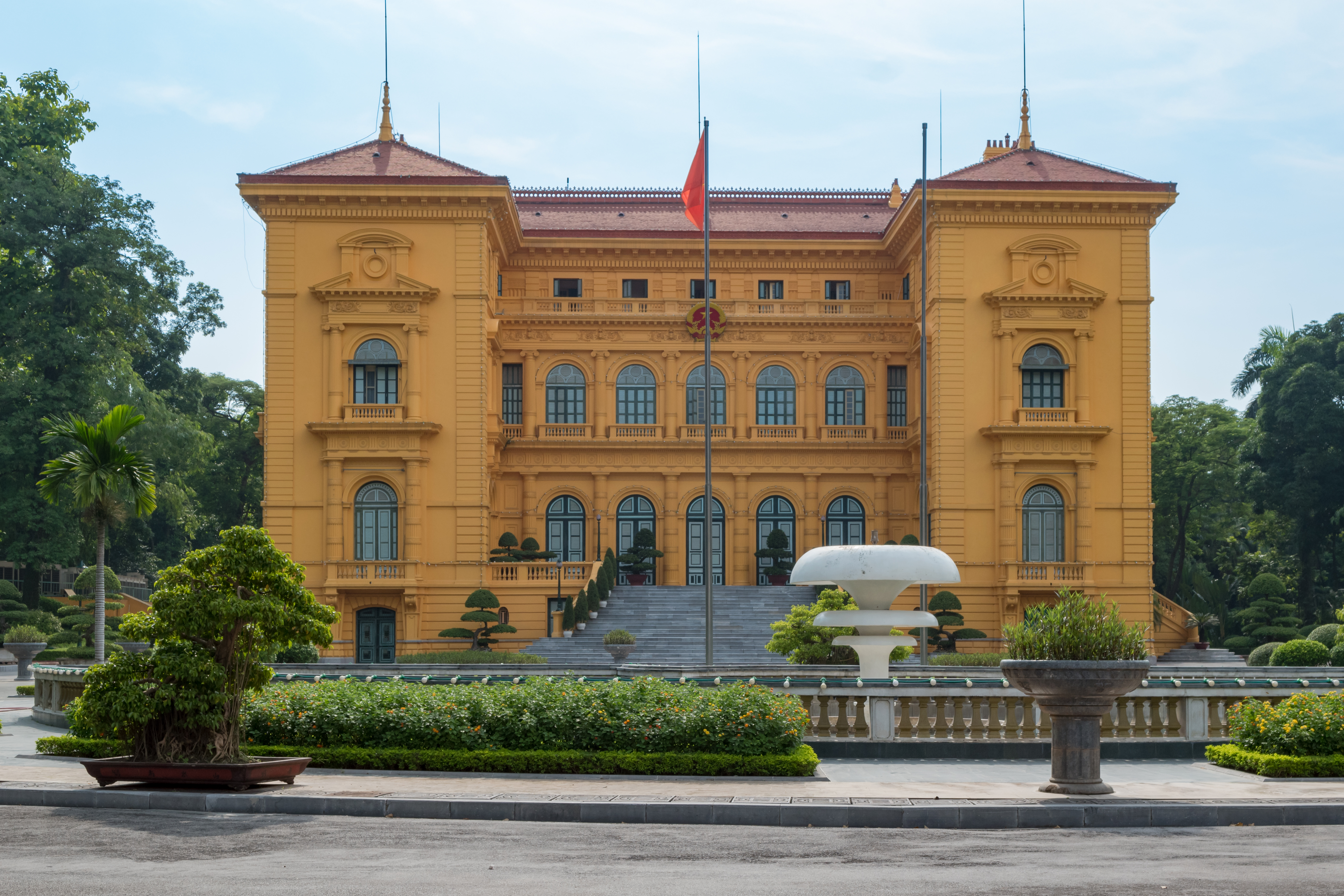 Presidential Palace Hanoi Vietnam Saigon